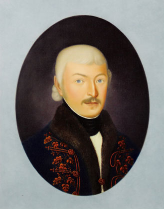 Barcsay László magyar kamarás, műfordító, színműíró.